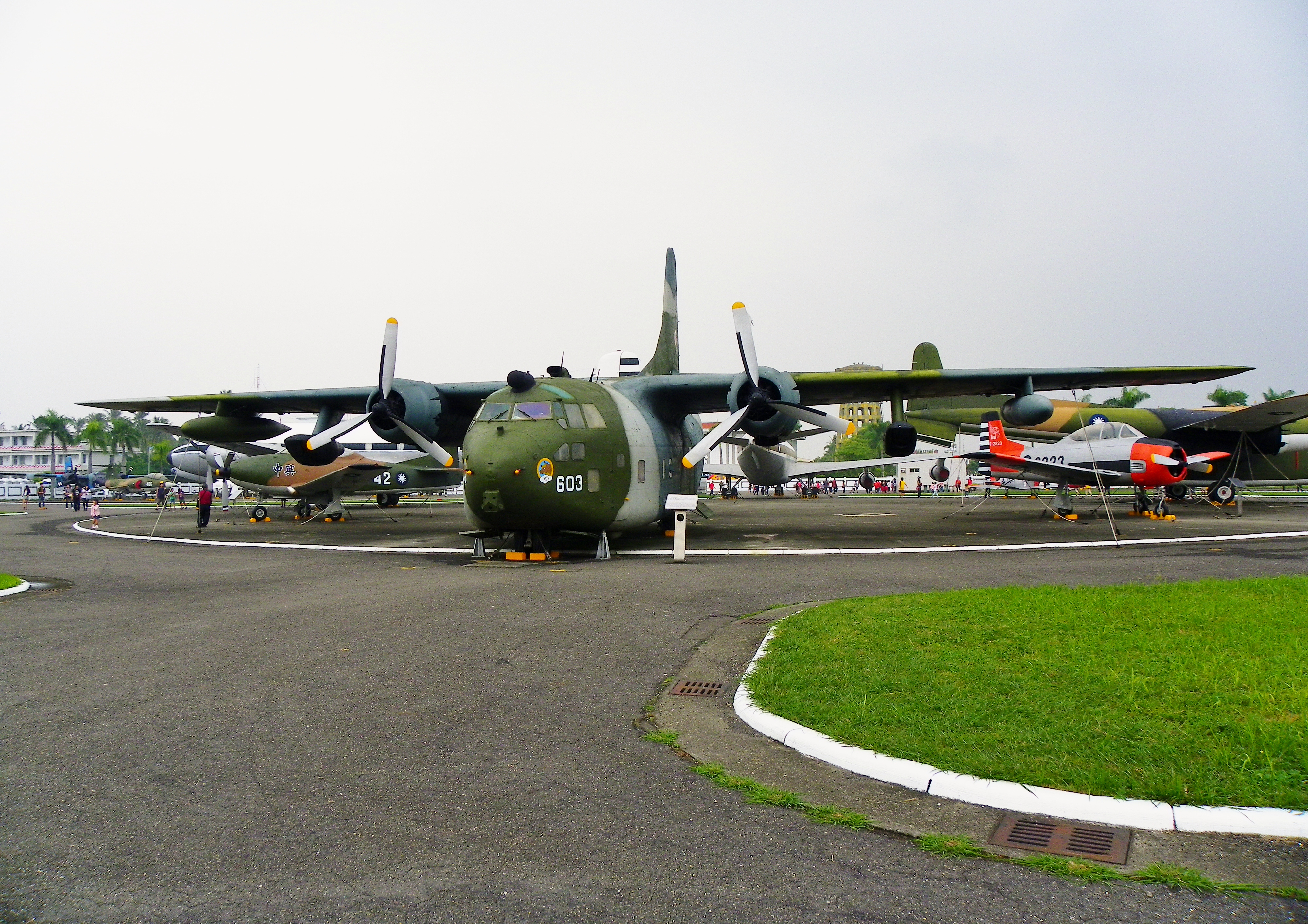 中文（台灣）: 右斜前方所見中華民國空軍C-123運輸機正面，攝於岡山空軍官校軍機展示場。